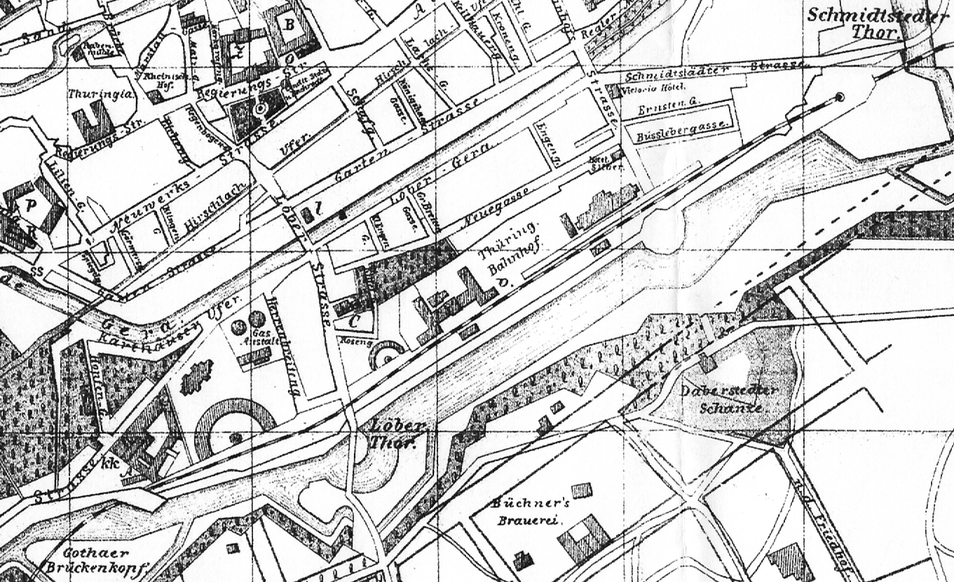 Gerhardt & Schreiber: Plan der Stadt Erfurt 1881